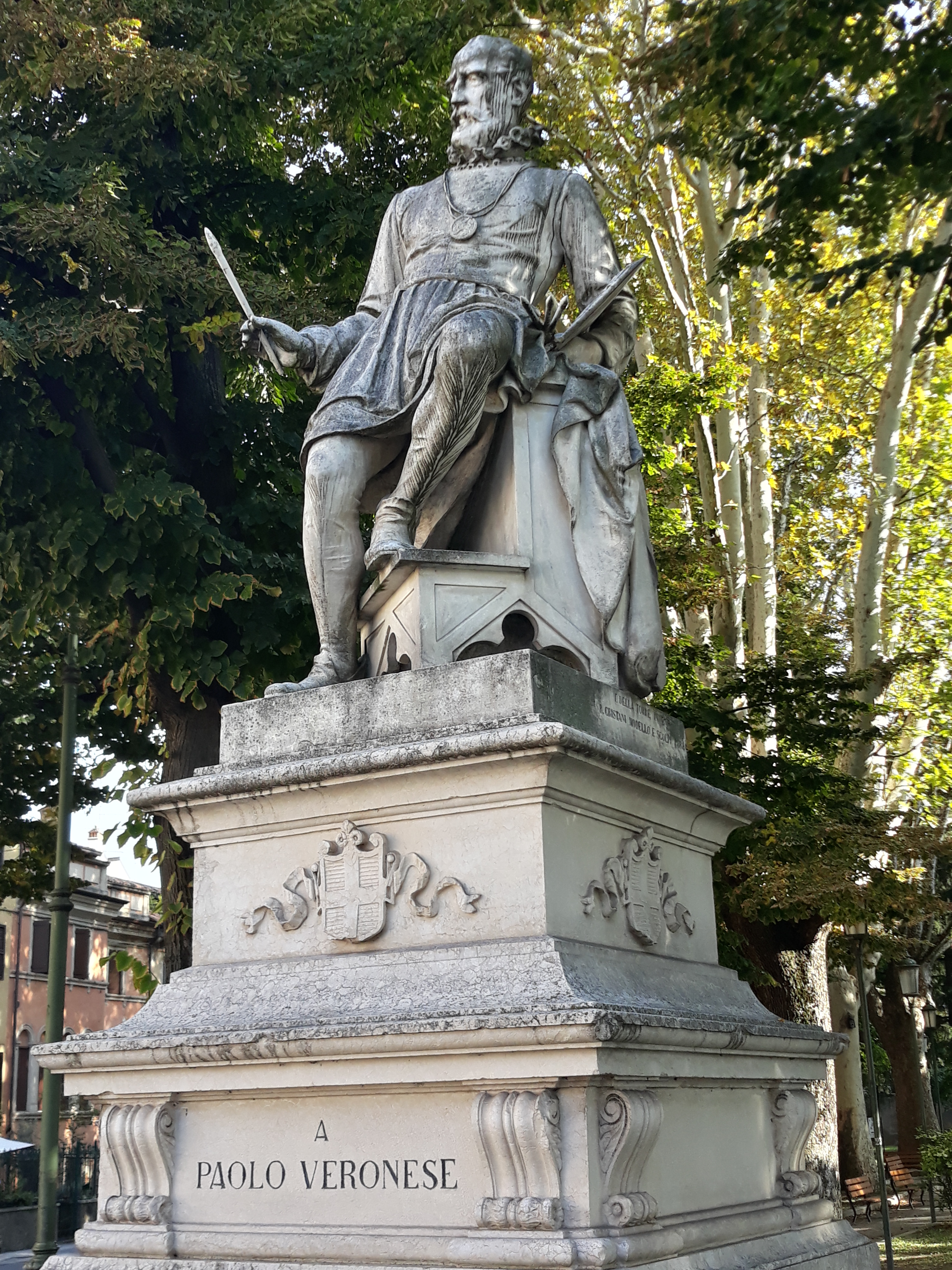 Statua dedicata a Paolo Veronese, a Verona